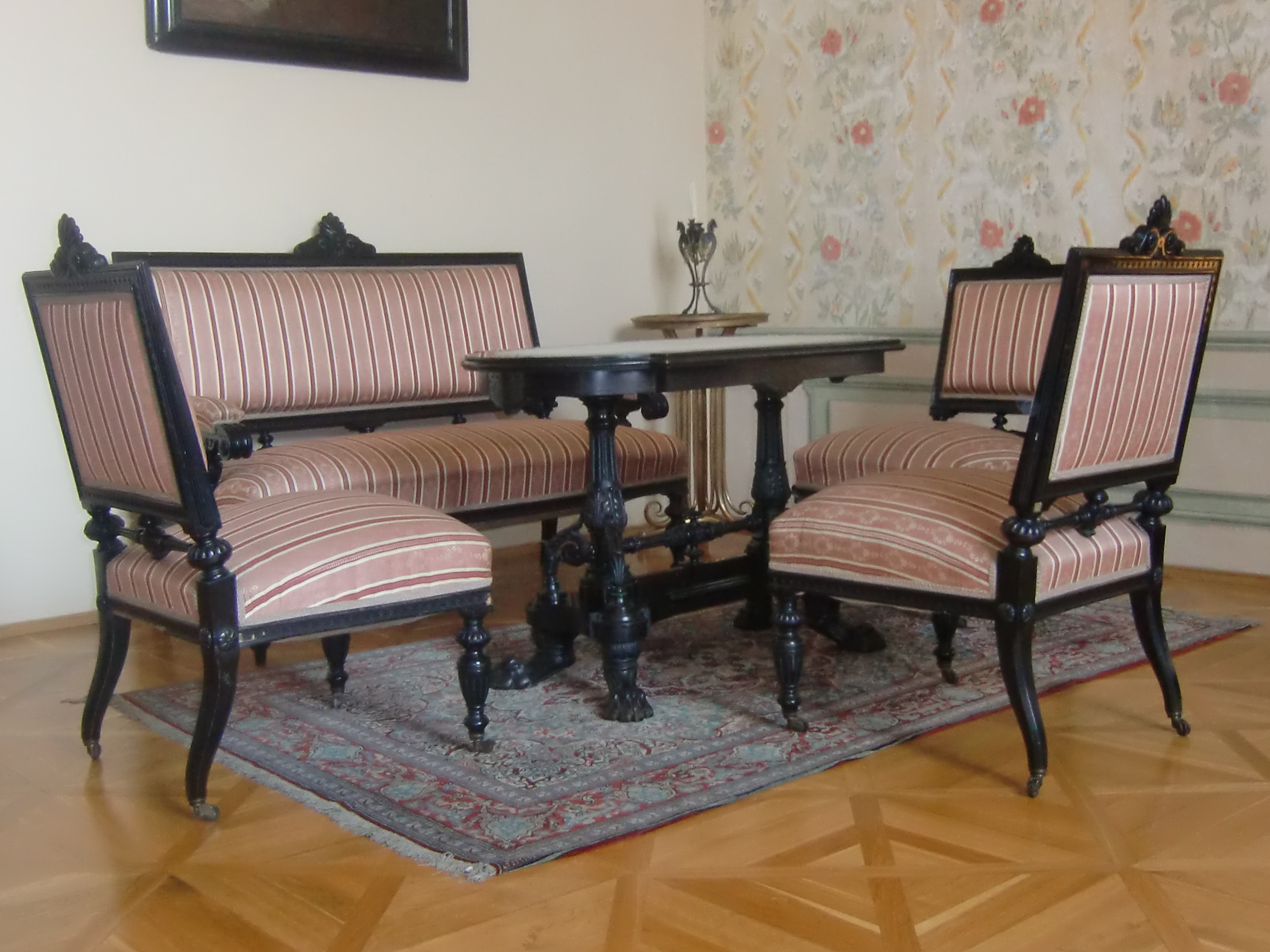 Nábytkový set v historizujícím stylu v Muzeu Bruntál